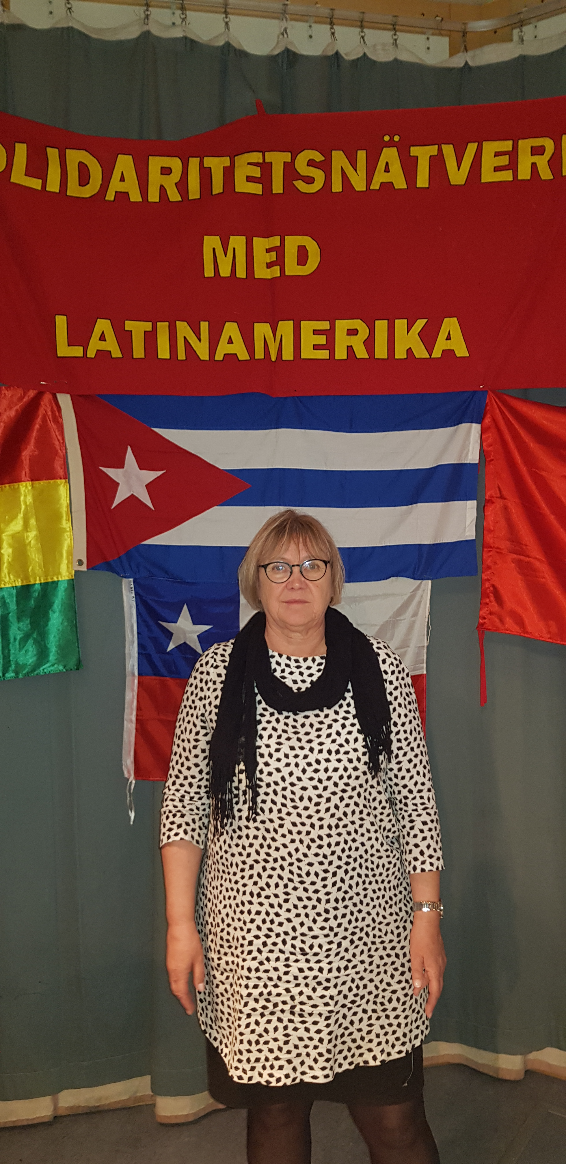 Ann-Margarethe Livh från Vänsterpartiet 2019